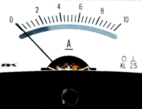 Bildbeschreibung: Amperemeter Fotograf/Zeichner: selbst